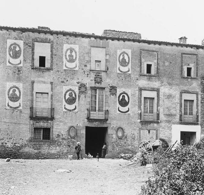 Torre Tabernera a Vallromanes. Josep Salvany i Blanch (1913)